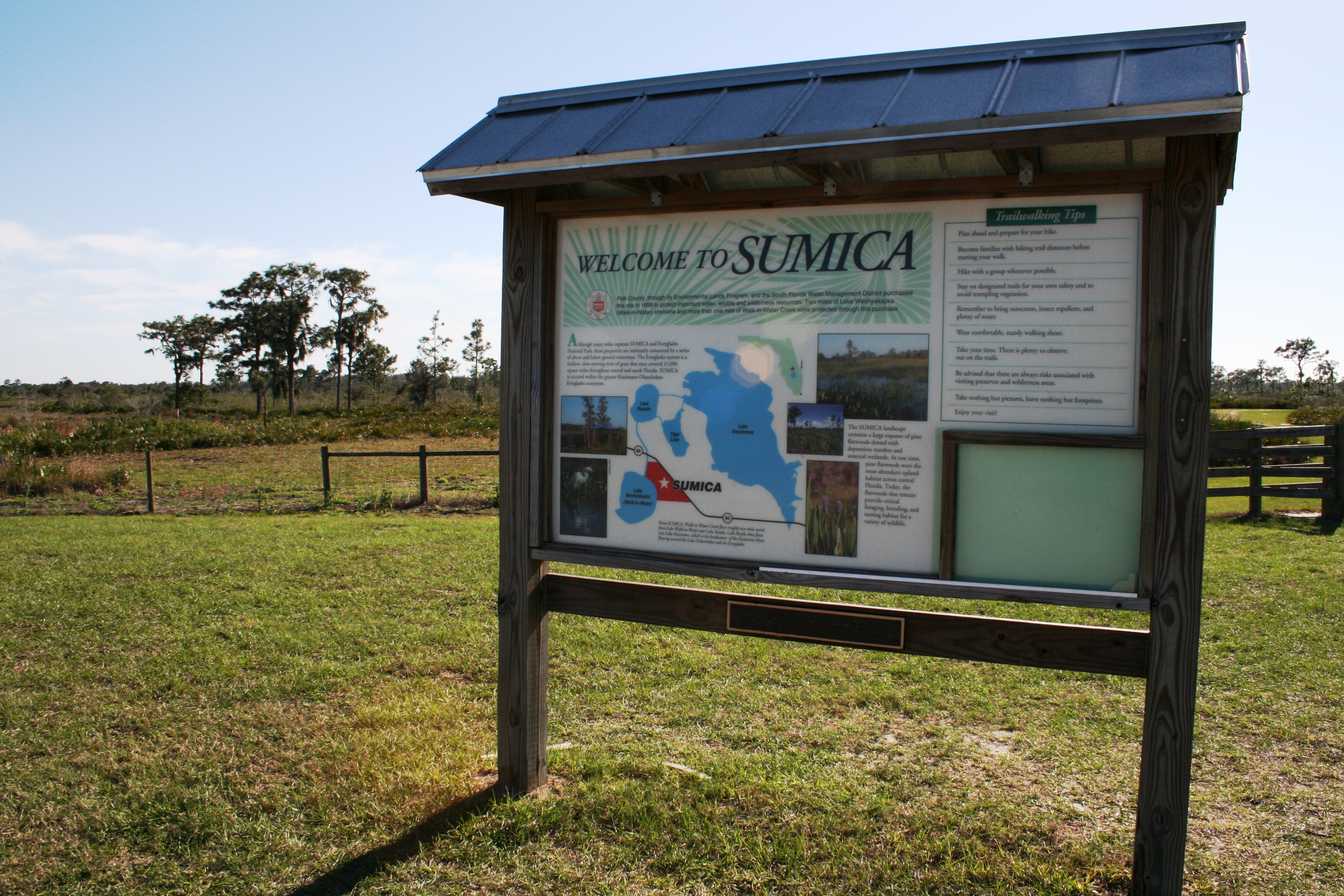 SUMICA 02